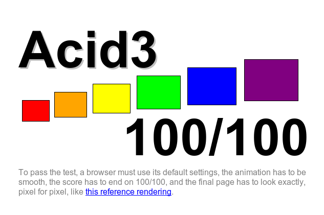 Google Chrome 6.0.472.63 sürümünün Acid3 test sonucu.